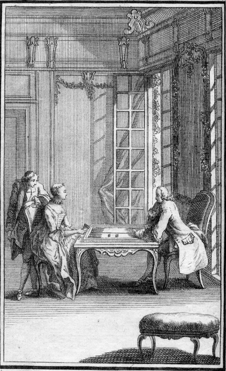 Français, gravure sur le trictrac